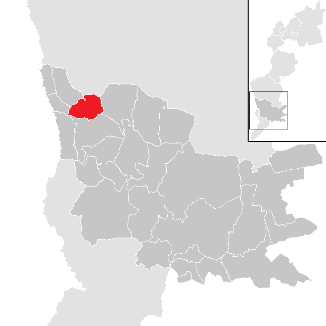 Bezirk Güssing